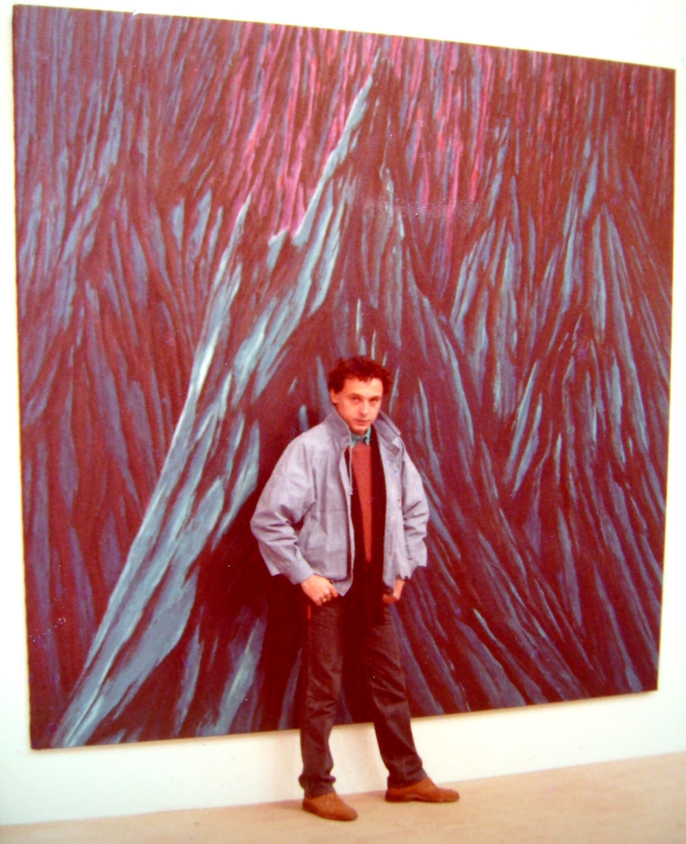 Foto do artista plástico Claudio Fonseca tirada durante a exposição de artes Bienal na França em 1985.